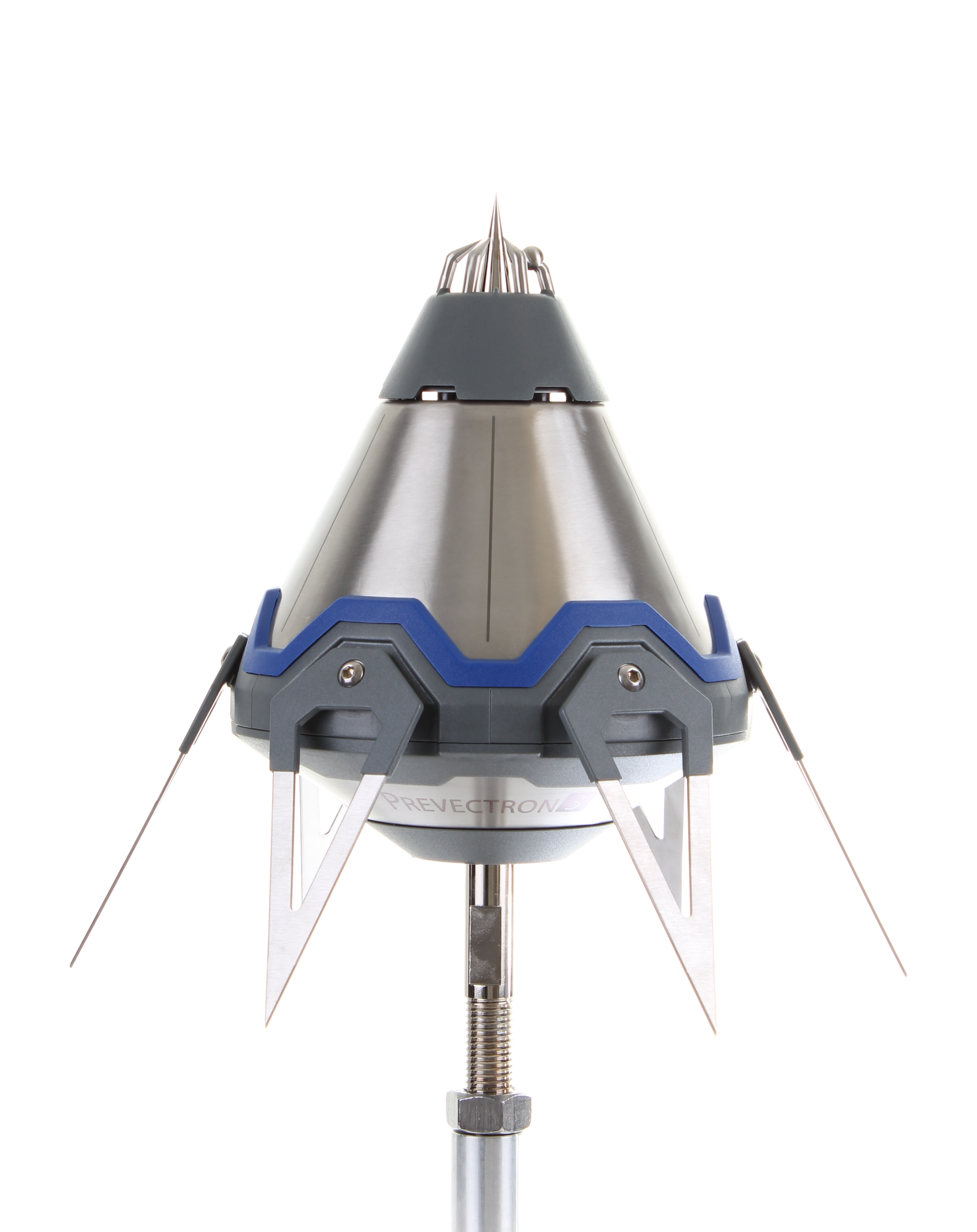 Молниеприемник PREVECTRON 3 от Indelec